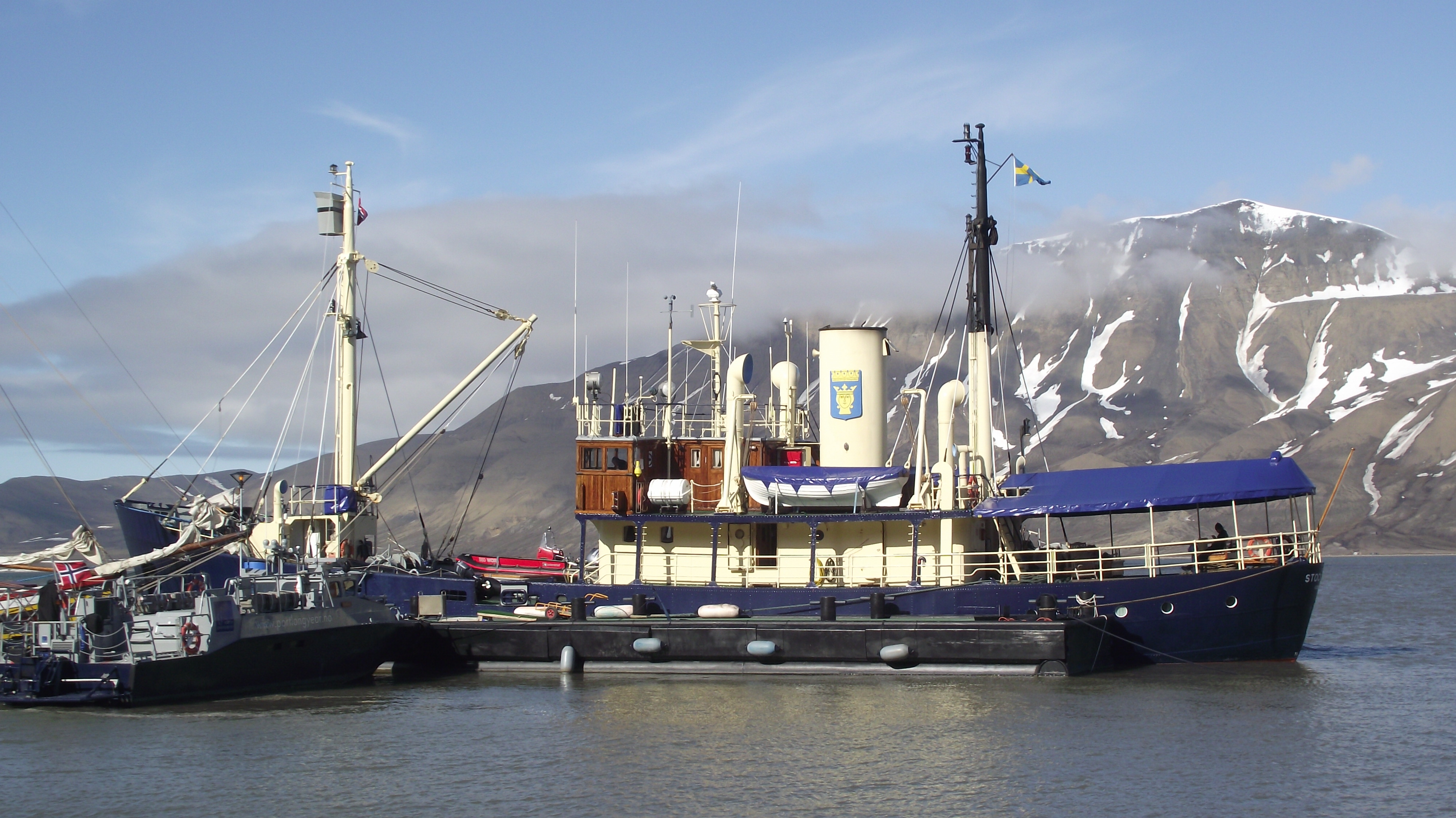 Schip bij Longyearbyen haven.